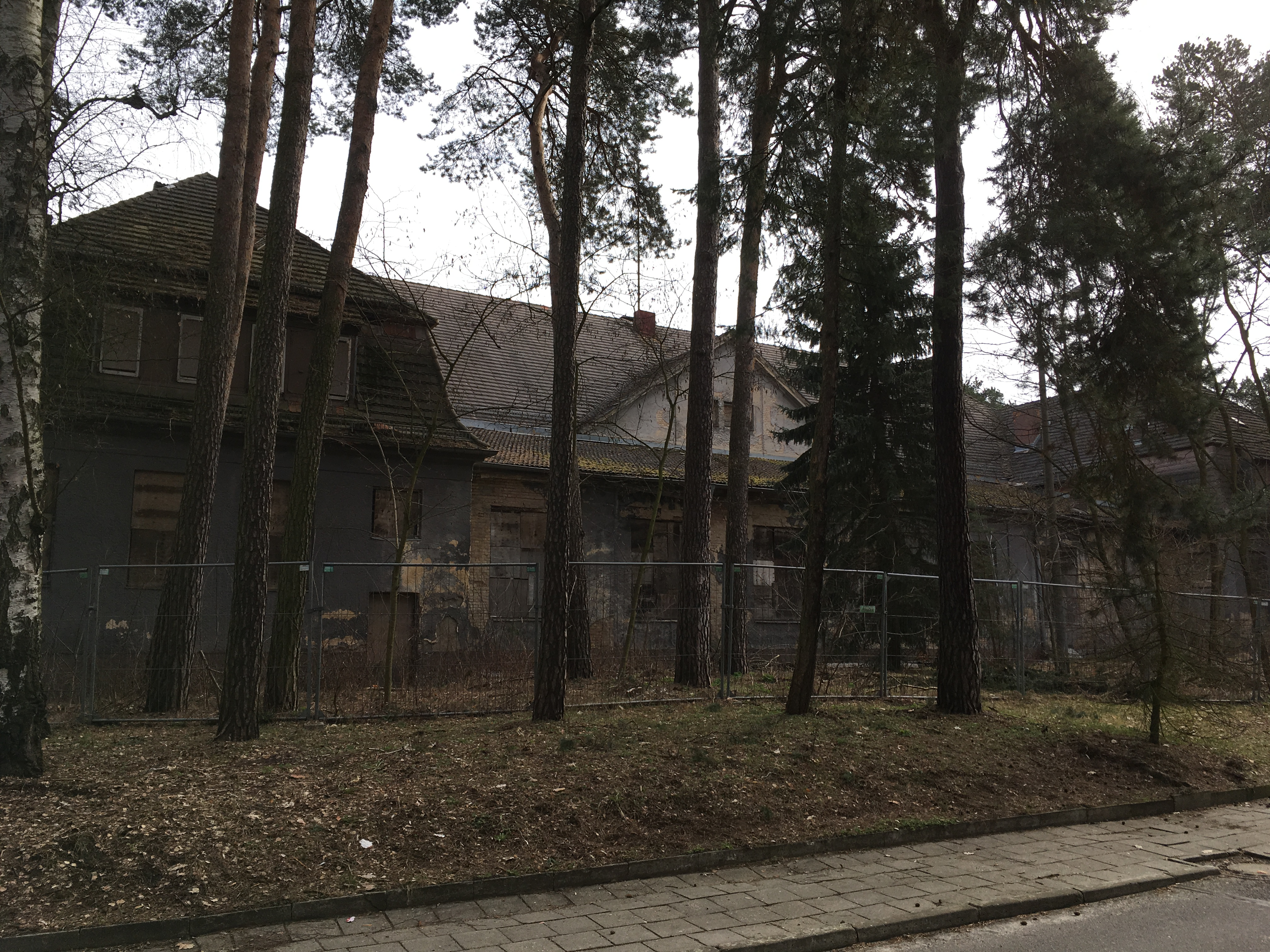 Der Historischer Rundweg durch die Verbotene Stadt ist ein rund 11 km langer Rundweg in Zossen. Er erschließt die Waldstadt, in der 1910 ein Kaiserlicher Truppenübungsplatz entstand. Er wurde 1935 vom Oberkommando des Heeres und ab 1945 von der Gruppe der Sowjetischen Streitkräfte in Deutschland genutzt.